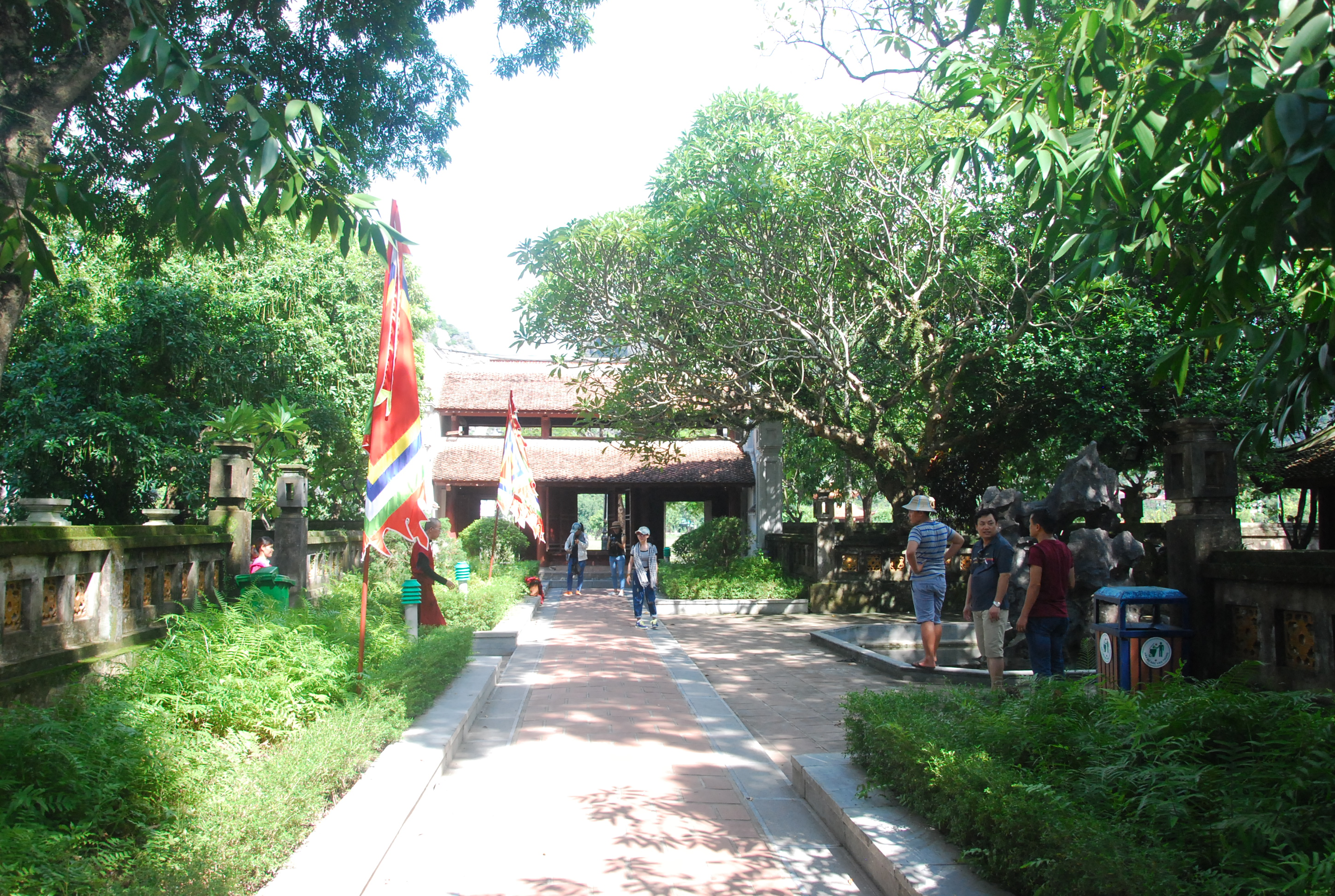 Phong cảnh đền Vua Lê Đại Hành trong Quần thể di tích Cố đô Hoa Lư ở Ninh Bình